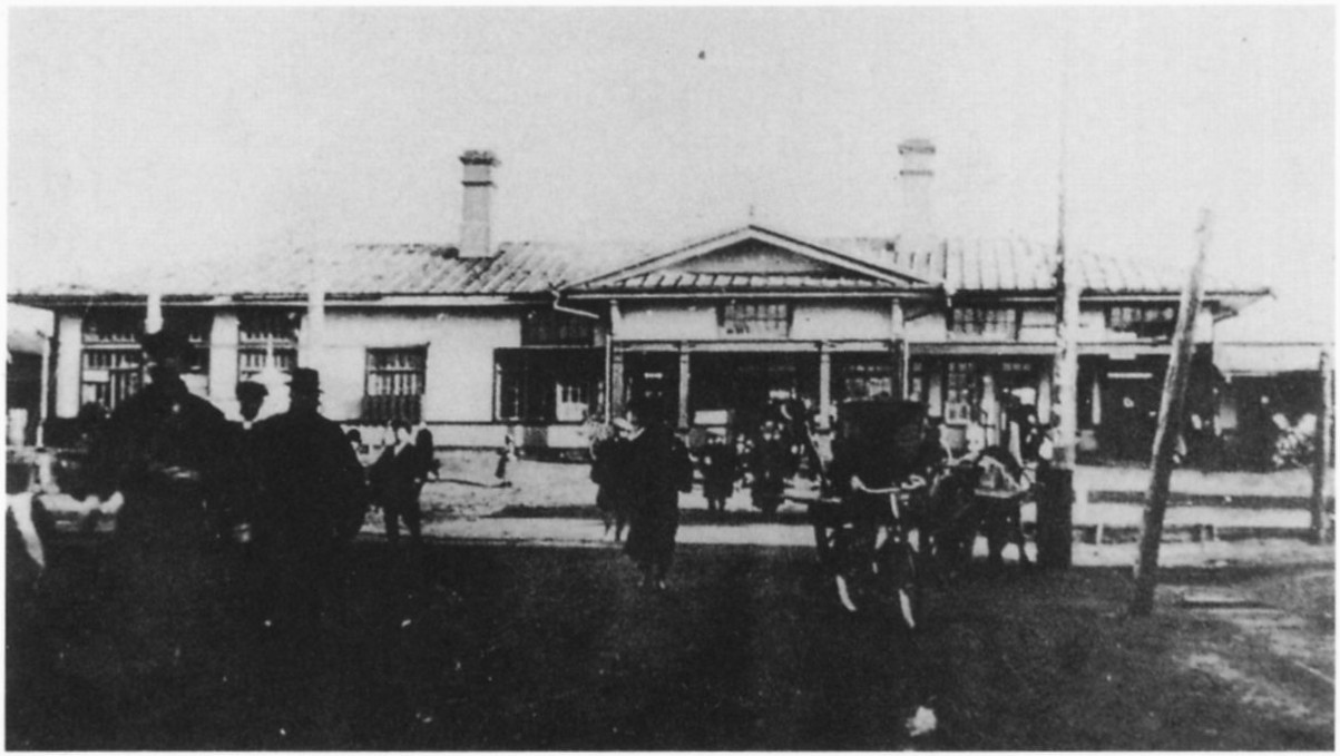 大正5年撮影、明治44年7月完成の2代目苫小牧駅舎。